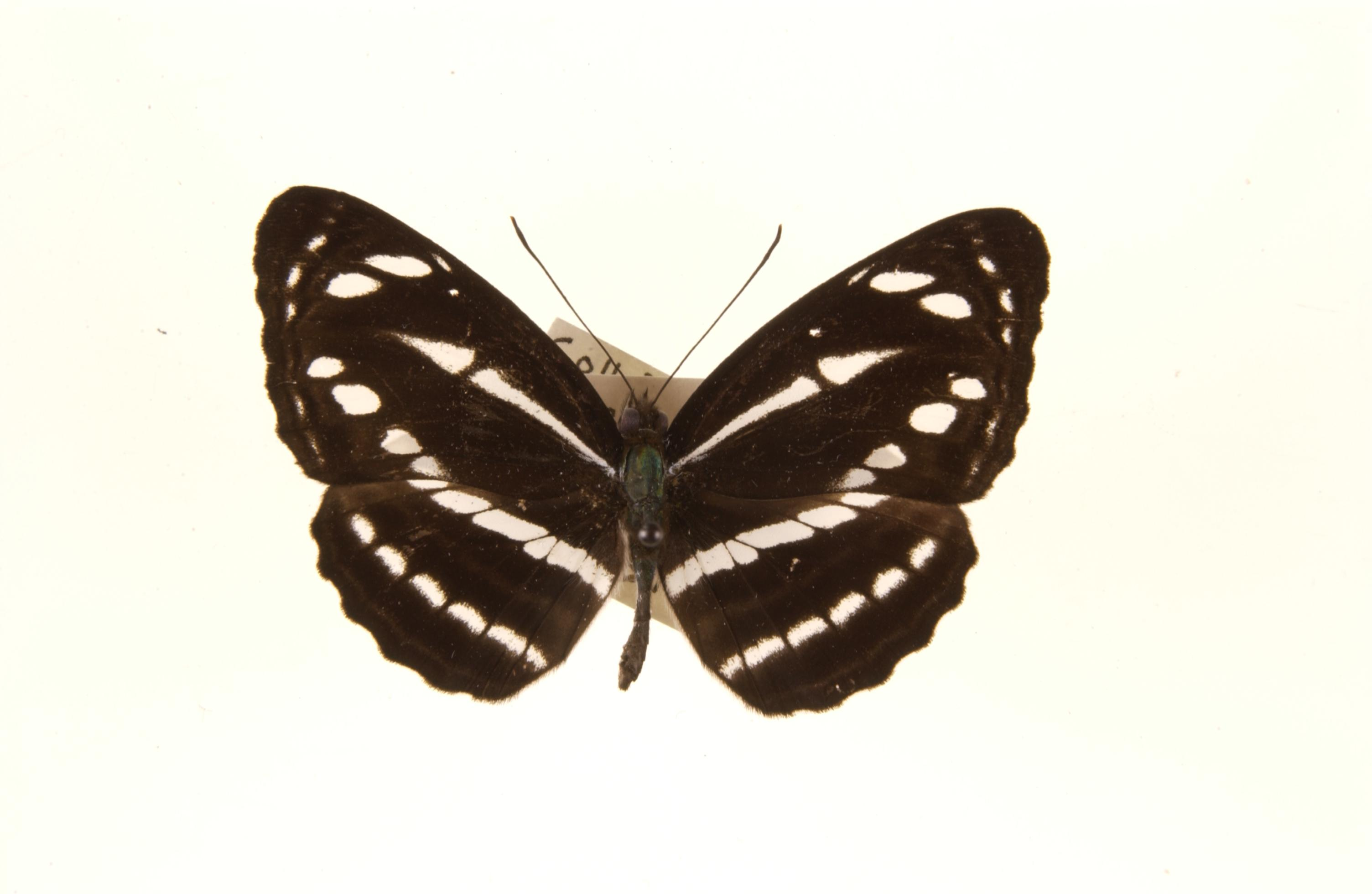 Neptis nata Malaya